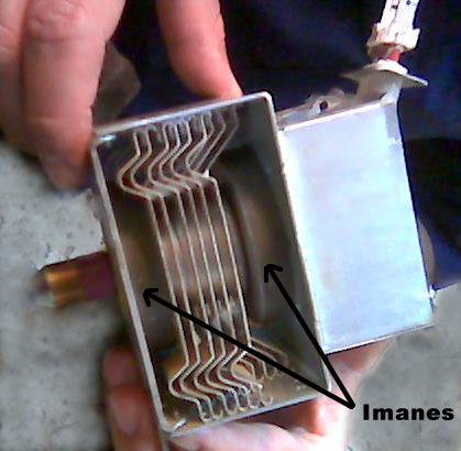 Magnetrón y sus imanes